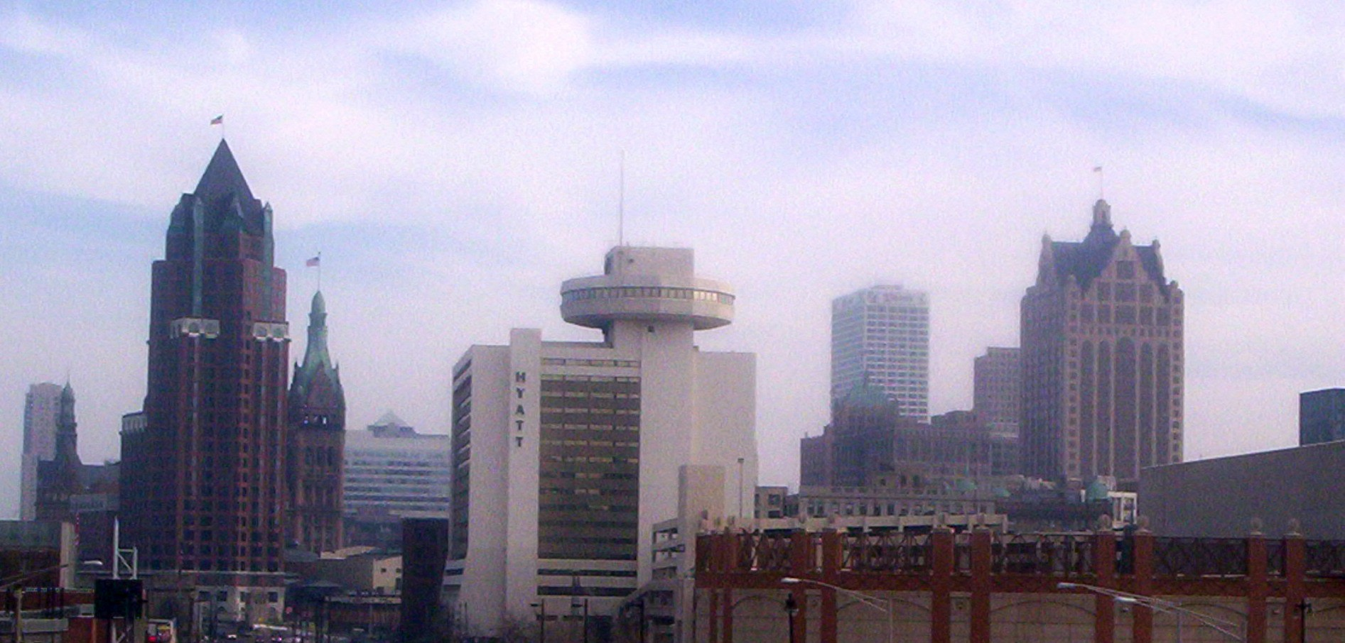 Skyline of Milwaukee